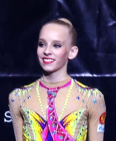 Jana Kudrjavceva